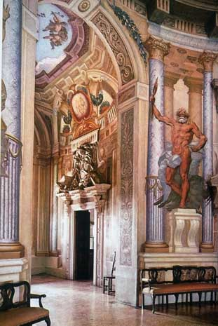 Villa Capra, "La Rotonda" Vicenza, comenzada en 1566. Interior de la sala central, con frescos de Dorigny - Siglo XVII.; southeast